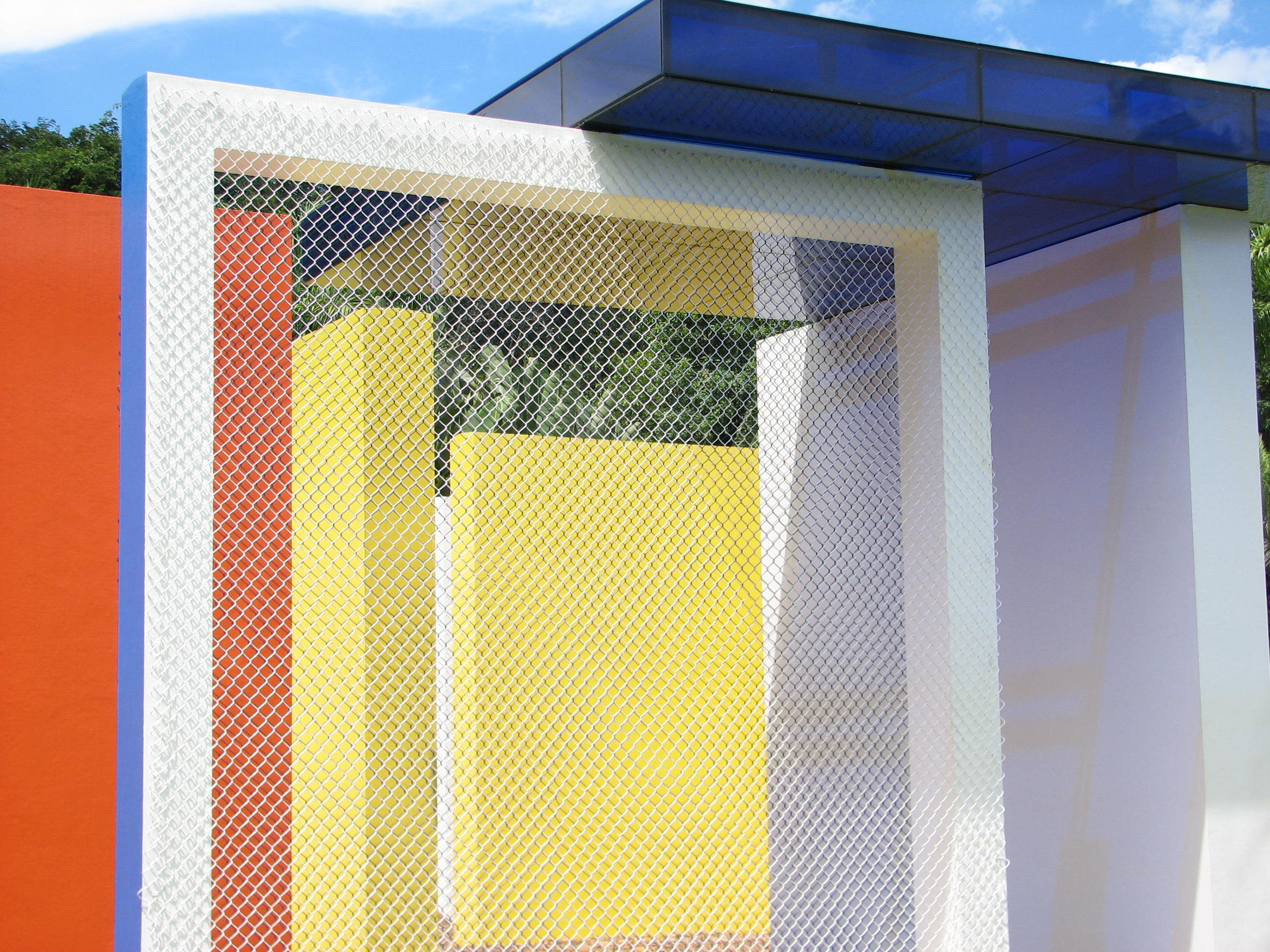 Hélio Oiticica at Inhotim in Brumadinho/Brazil